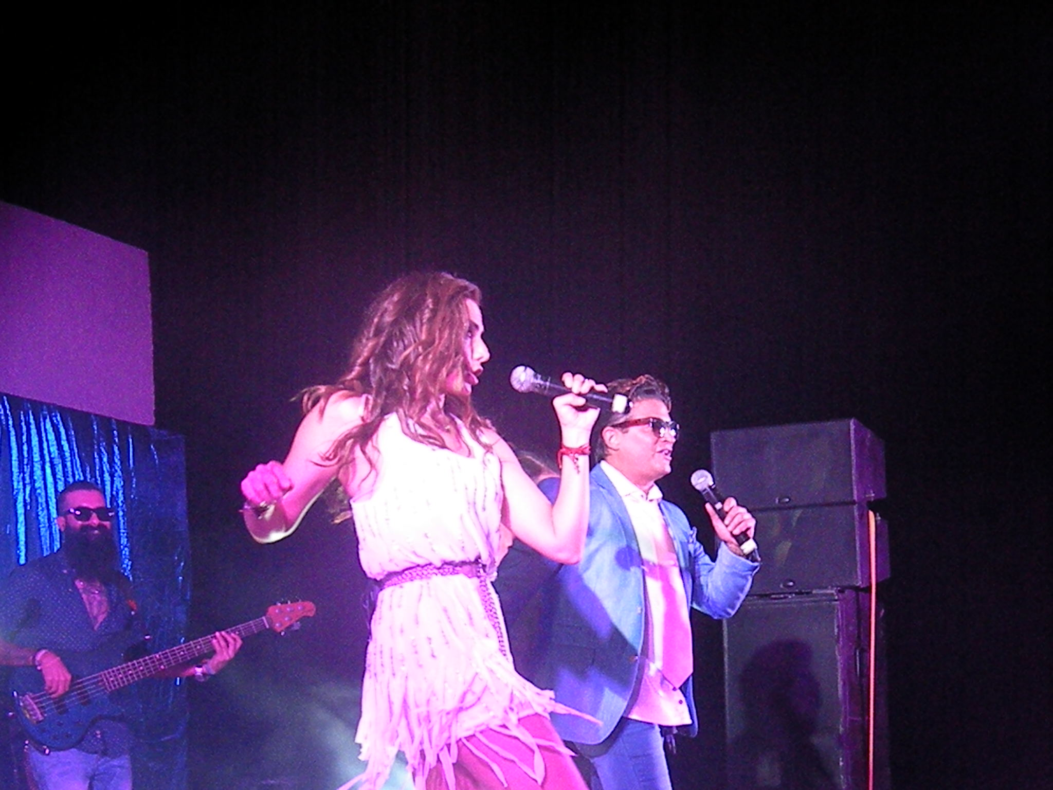 Juntos Alexa Mano en concierto. Marzo 19, 2016.